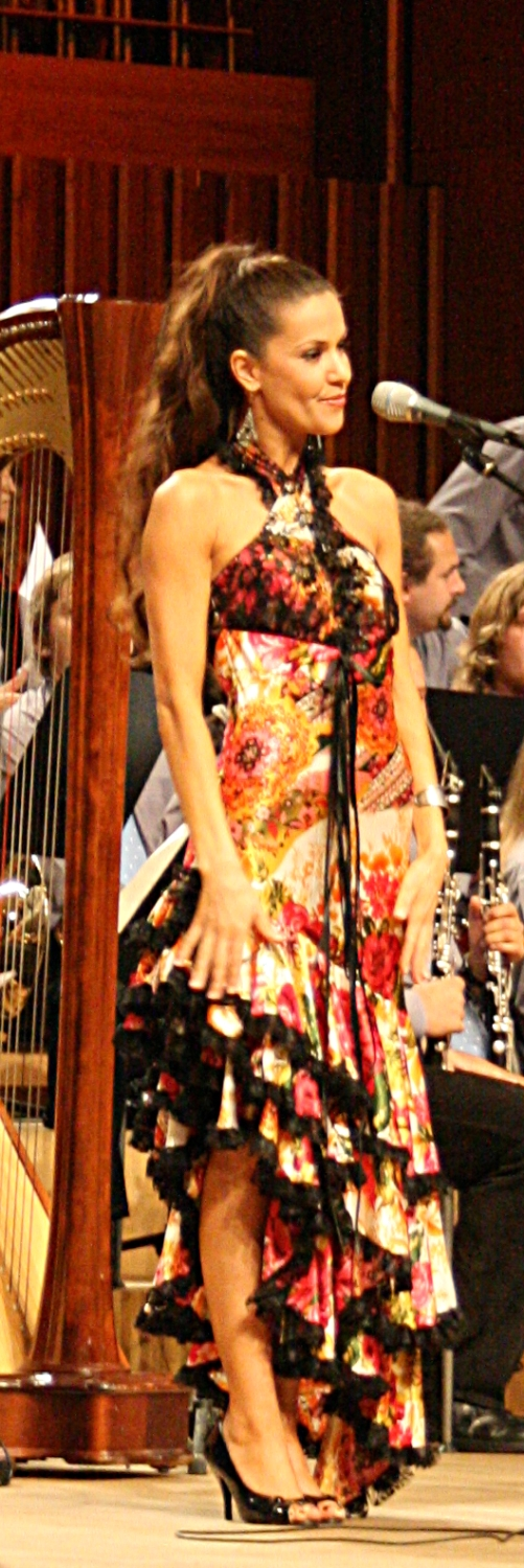 Dobrotvorni koncert "Križ nek' ti sačuva ime" u koncertnoj dvorani Vatroslav Lisinski u Zagrebu.